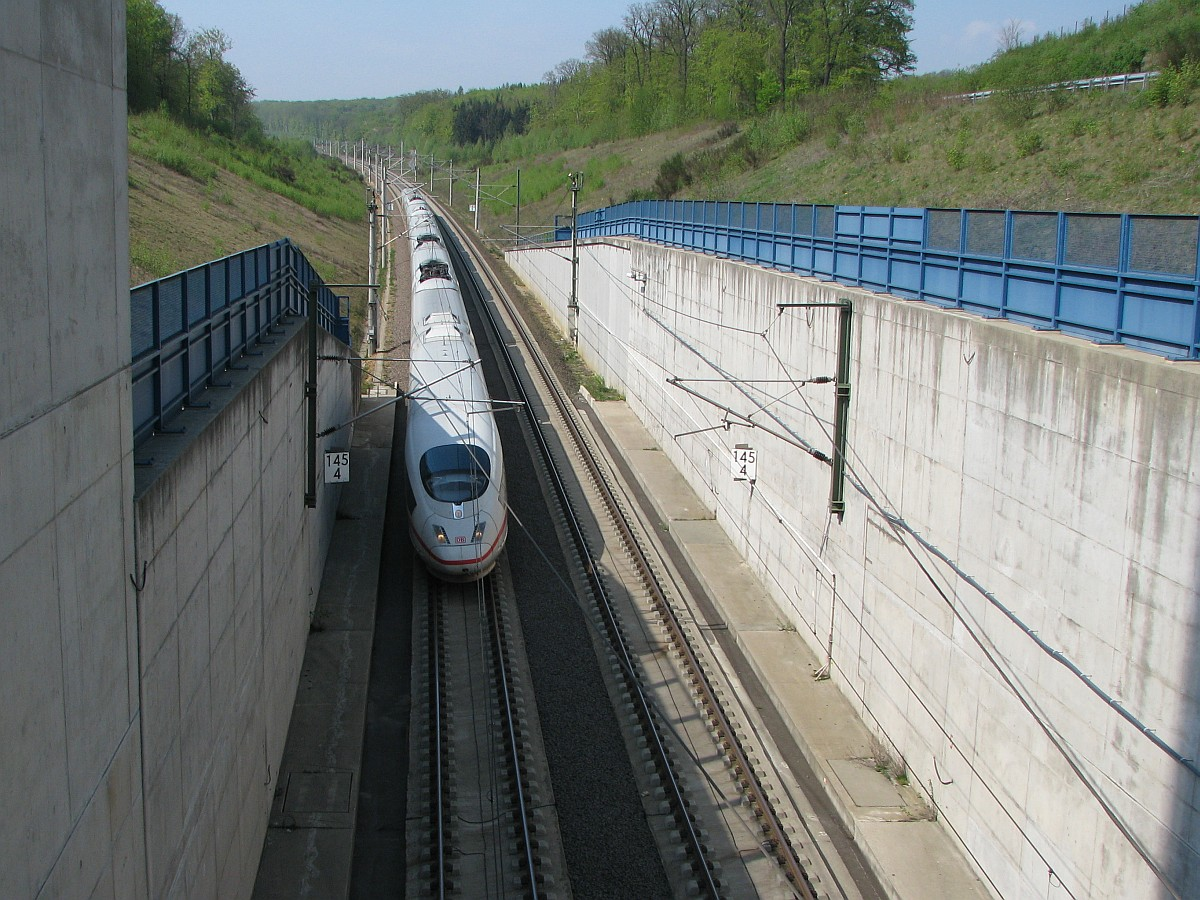 Wiesbaden-Auringen ICE 3 Einfahrt in Schulwaldtunnel längster Tunnel Schnellfahrstrecke Köln–Rhein Main Foto 2009 Wolfgang Pehlemann Wiesbaden IMG_4740